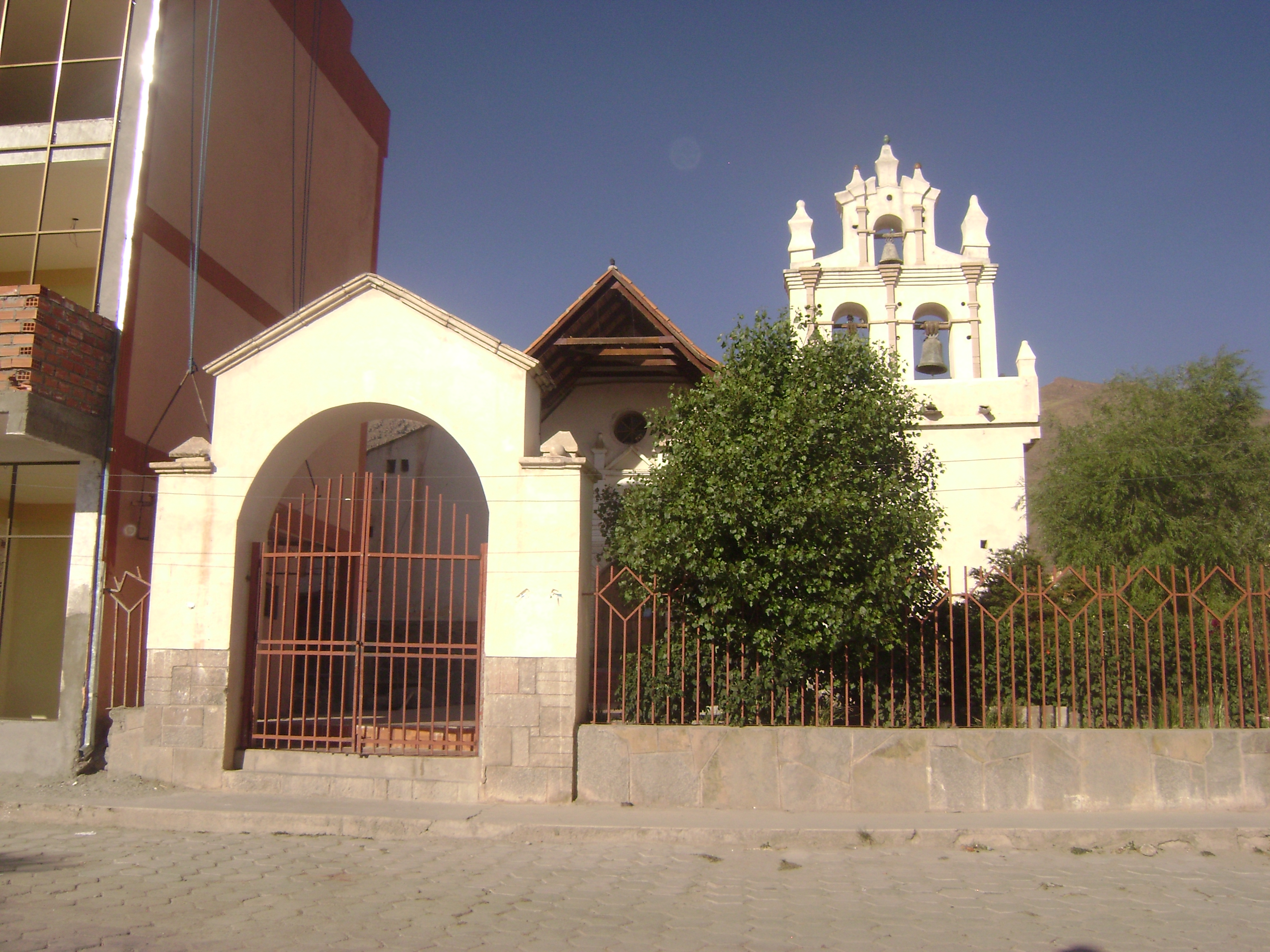 Iglesia ubicada en la plaza de Huachacalla